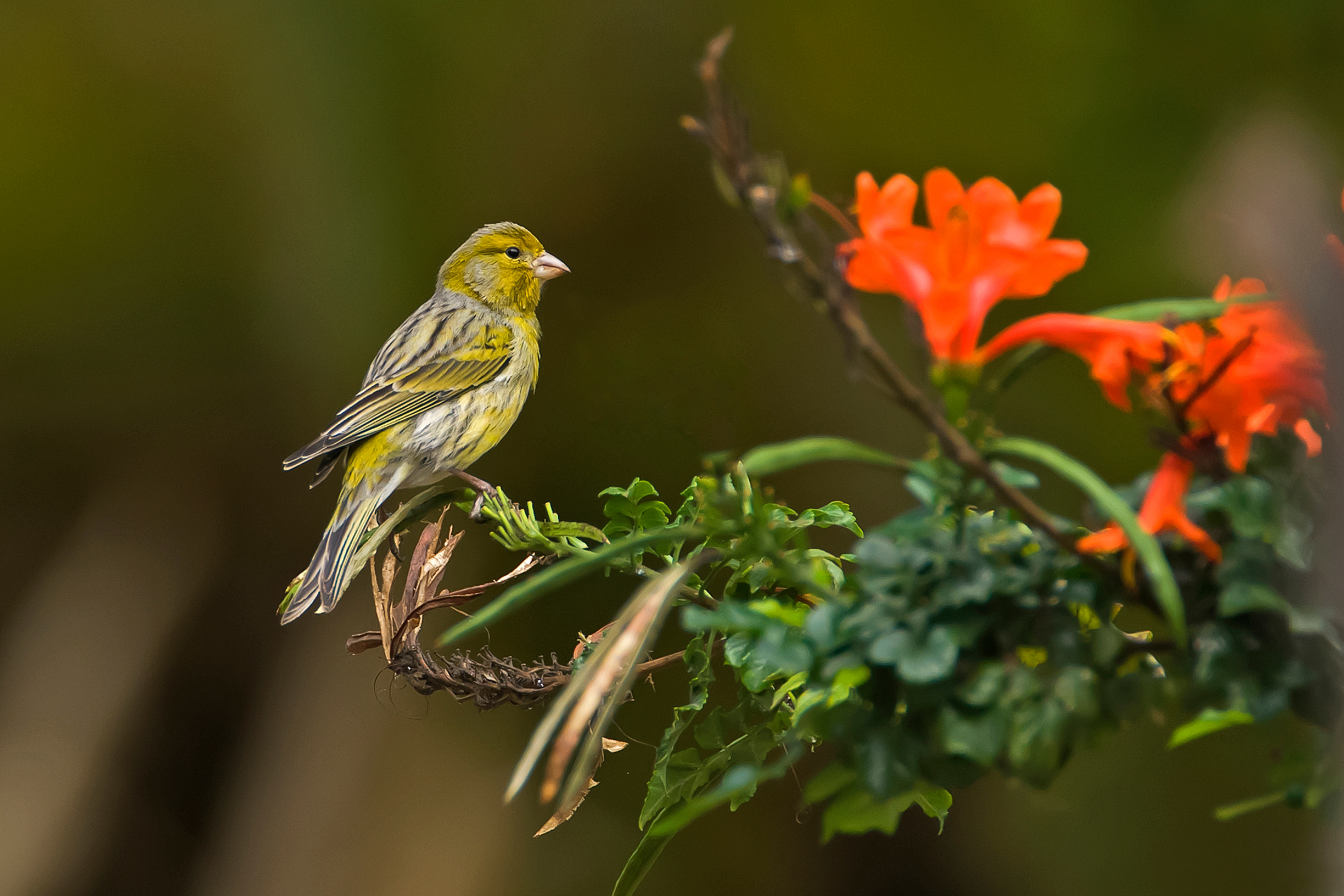 Nikon D300 + Sigma 120-300 f 2.8 + TCx14